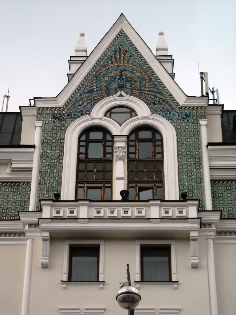 Petrovka Marriott hotel